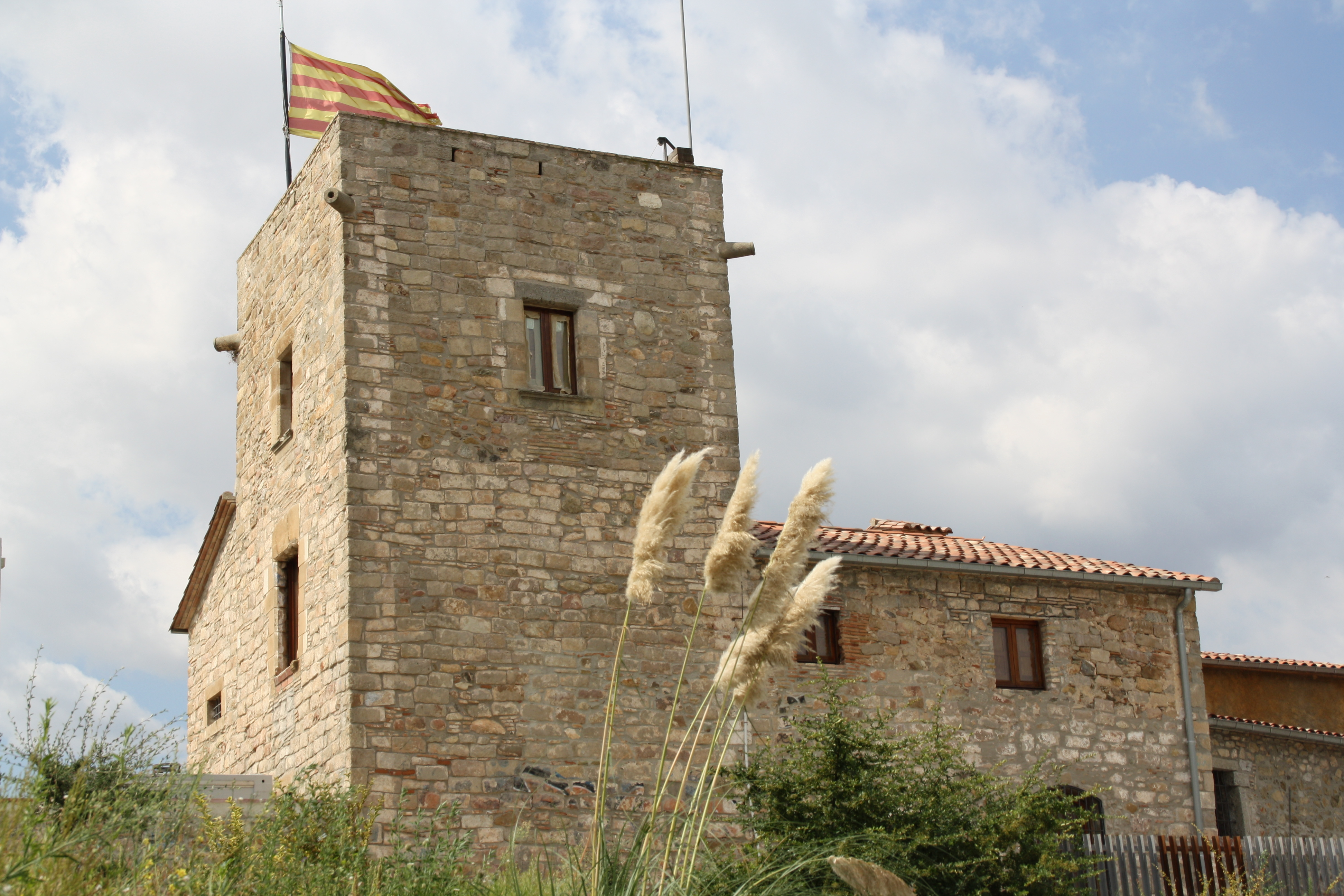 Vista general de Can Bofí, construcció del s.XV-XVI a Badalona.